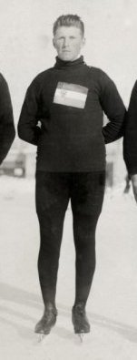 Vier van Nederlands beste schaatsenrijders die in Davos de eer van de Nederlandse vlag hooghouden. Vlnr; Dolf van der Scheer uit Zutphen, Teun Hoofdman, Willem Kos uit Oudkarspel, en Simon Heijden uit IJsselmonde, Davos, Zwitserland 1929.